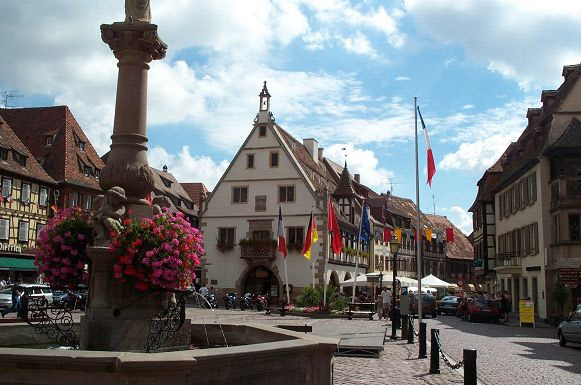 Place de la Mairie d'Obernai